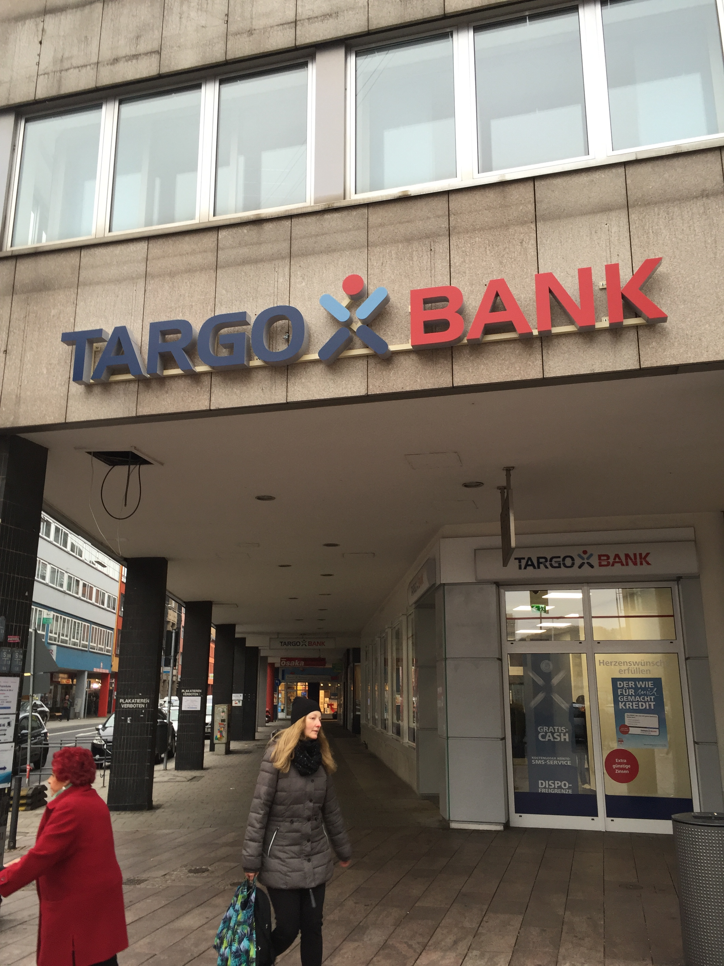 Targo Bank